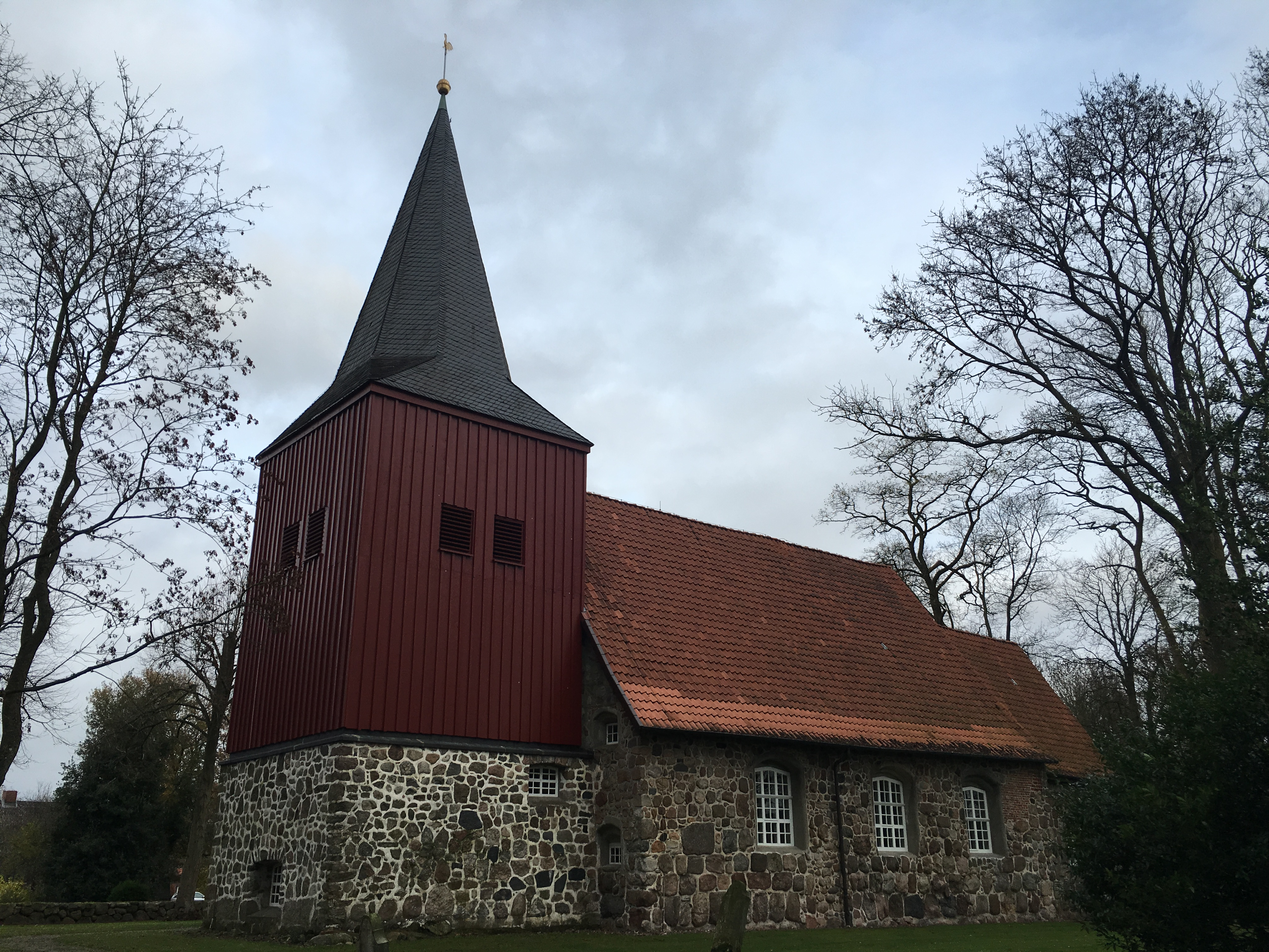 Gangolf-Kark in Örel